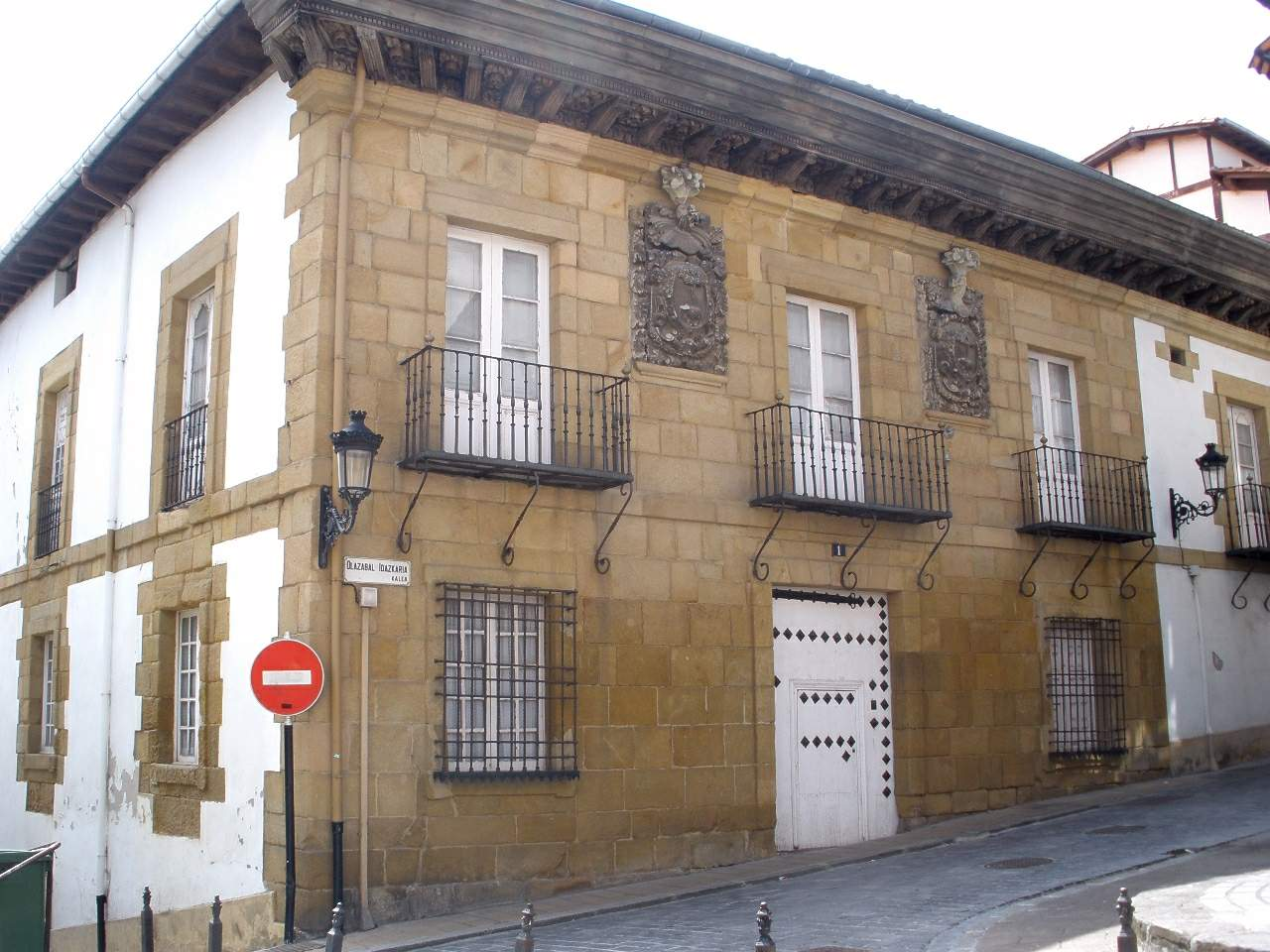 Zumaia (Gipuzkoa)